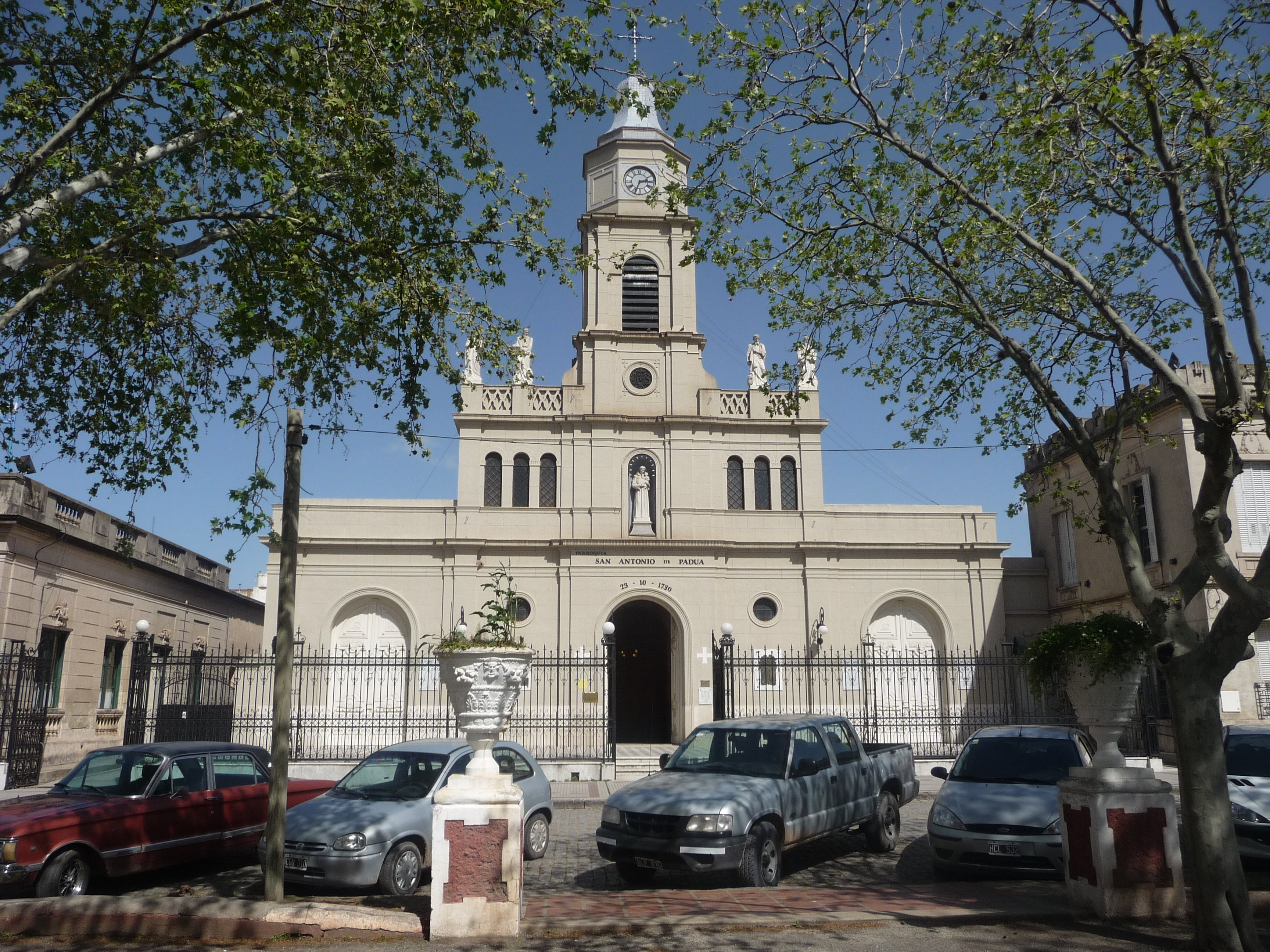 Templo Parroquial de San Antonio de Padua